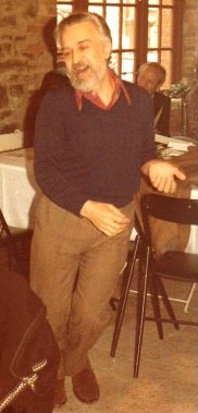 Jean-Marrie Masse en 1978, cliché pris par mes soins